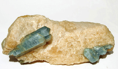 Апатит в кальците. Минералы Слюдянского месторождения слюды-флогопита.